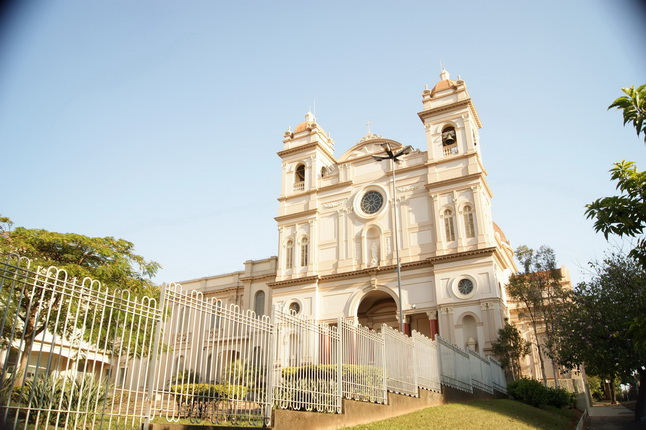 Imagem do município de Piracicaba, estado de São Paulo, Brasil.